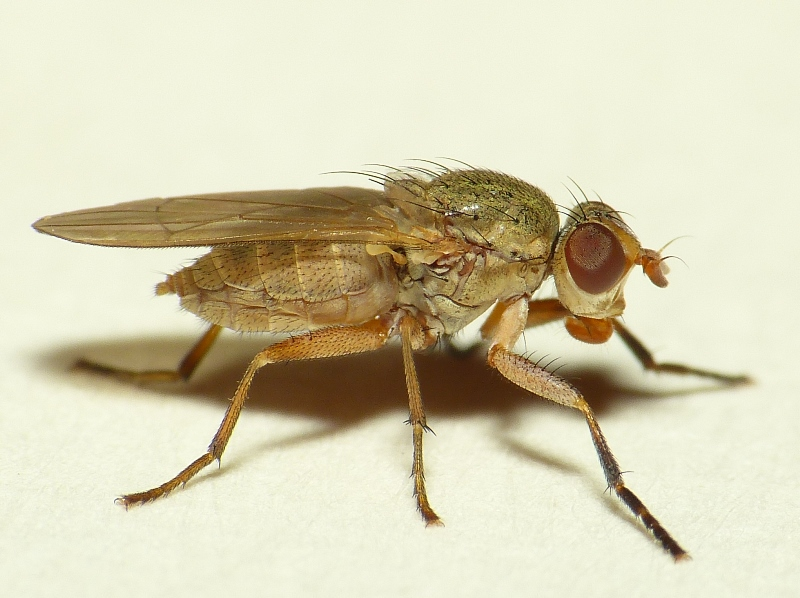 Ditaeniella grisescens, location: The Netherlands - Rhenen - Blauwe Kamer - Gelderland